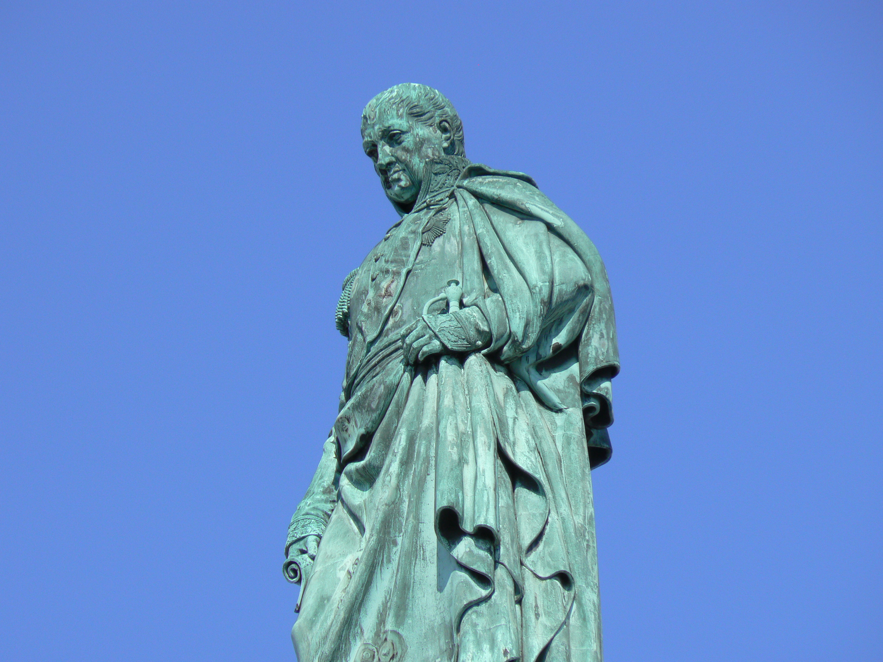 Ludwig I, first Grand Duke of Hesse, at Luisenplatz in Darmstadt, Germany